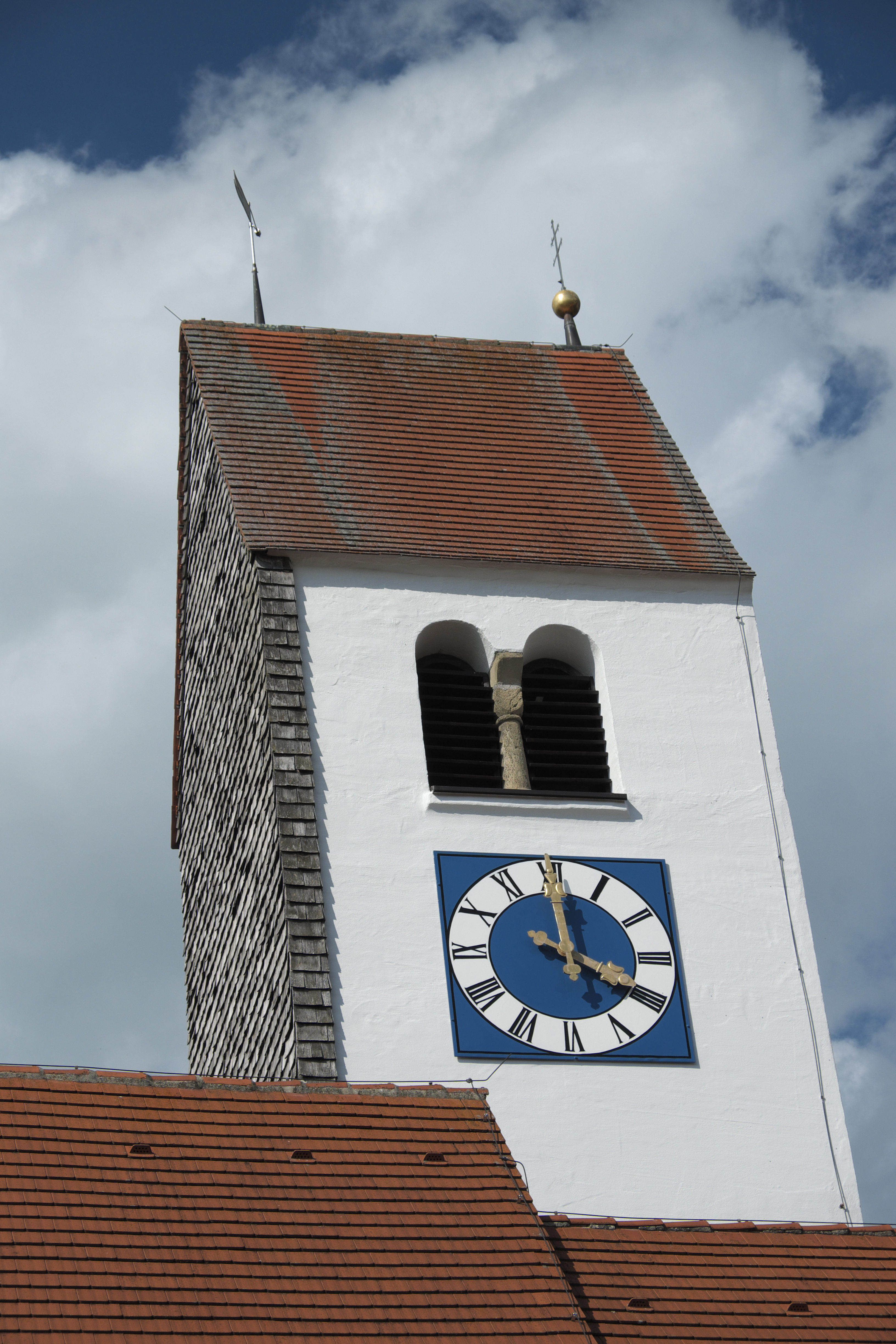 Katholische Filialkirche St. Maria Magdalena in Urspring, einem Ortsteil von Steingaden, im Landkreis Weilheim-Schongau (Bayern/Deutschland), Kirchturm